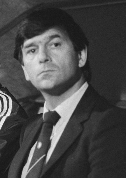 Feyenoord-trainer Václav Ježek (links) en hulptrainer Clemens Westerhof tijdens de wedstrijd afgelopen zaterdag